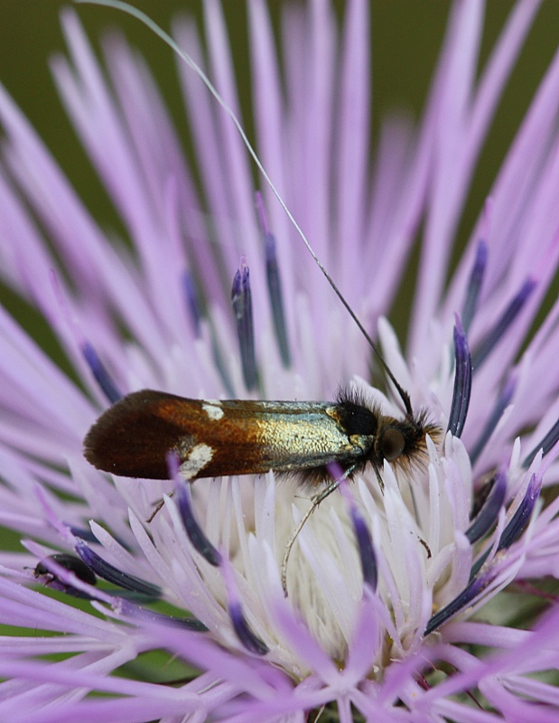 Fotografia realizada en las proximidades de San Jorge de Alor (Olivenza, España)